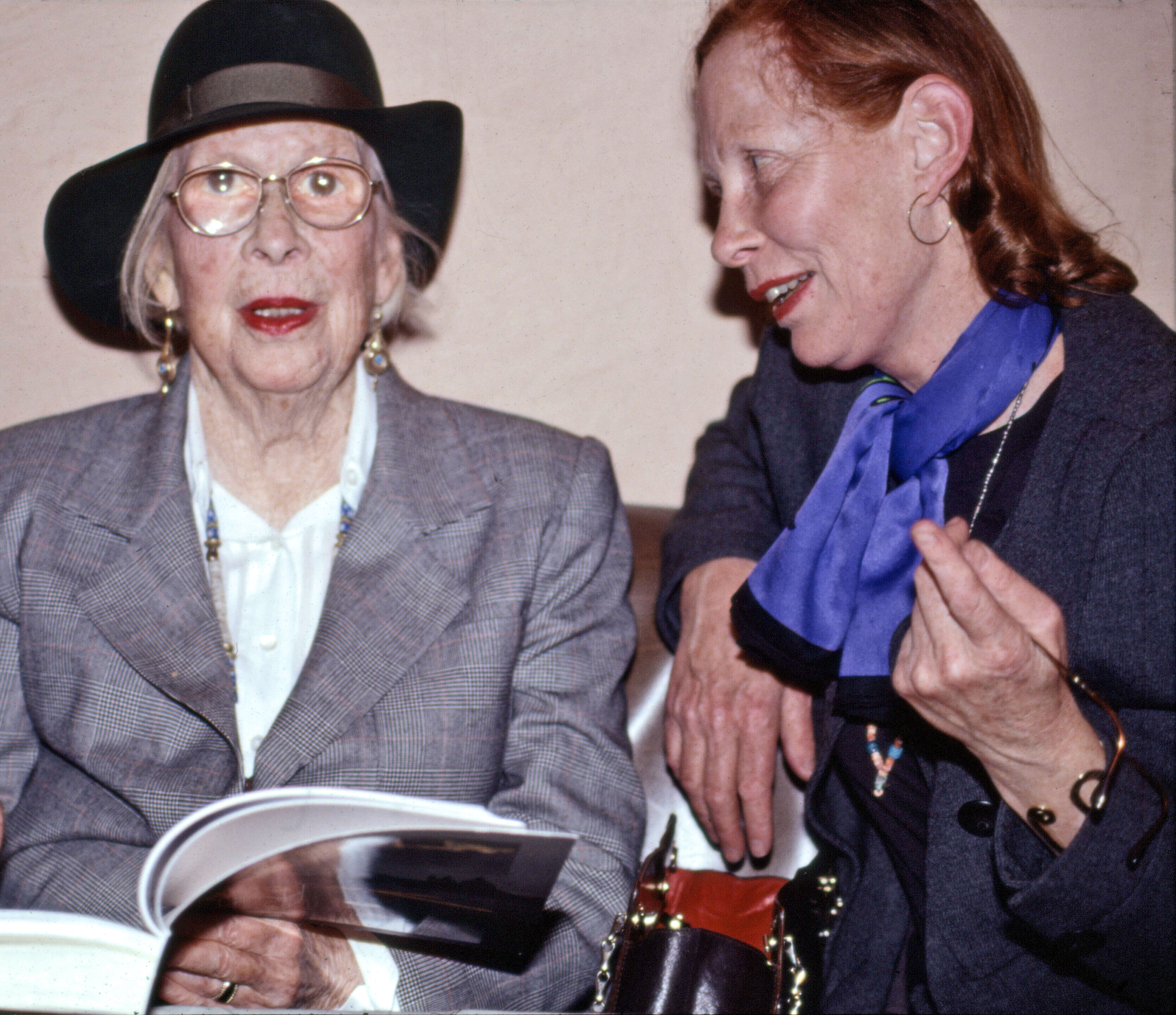 Alexina Duchamp assieme alla figlia Jacqueline Matisse a Palazzo Grassi a Venezia nel 1993